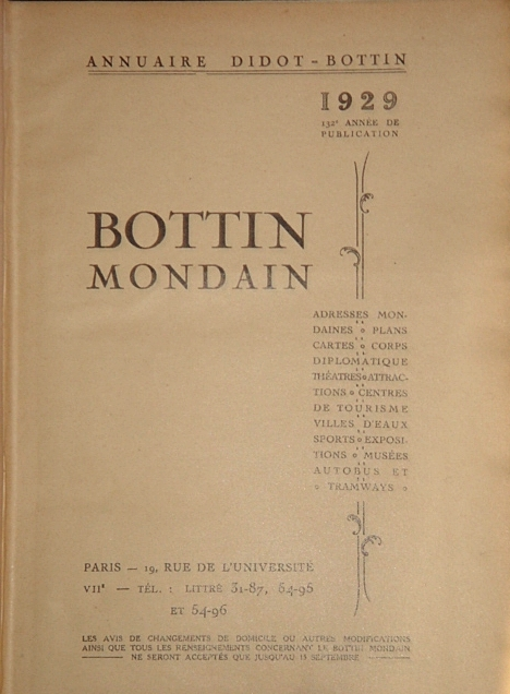 Page de titre du Bottin Mondain, éditions de 1929. Éditions Didot-Bottin.